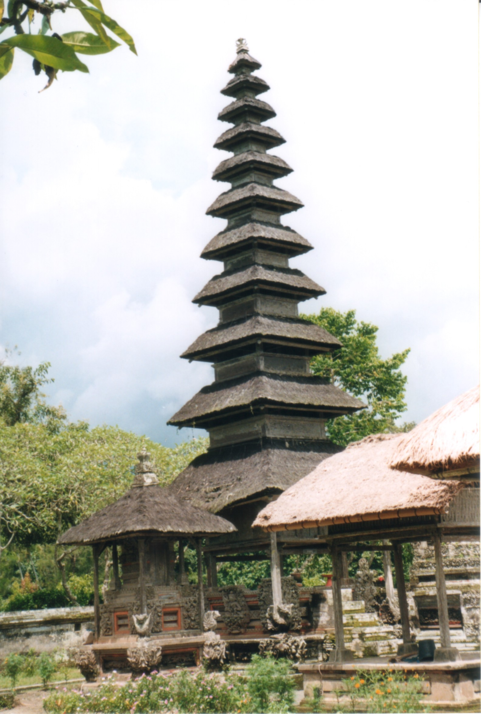 Bali - Tempio